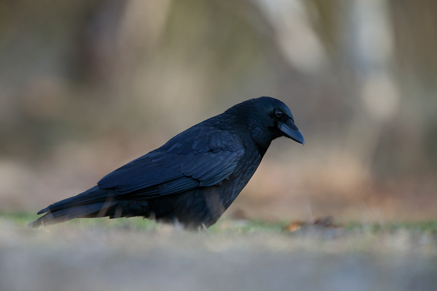 Corvus corone